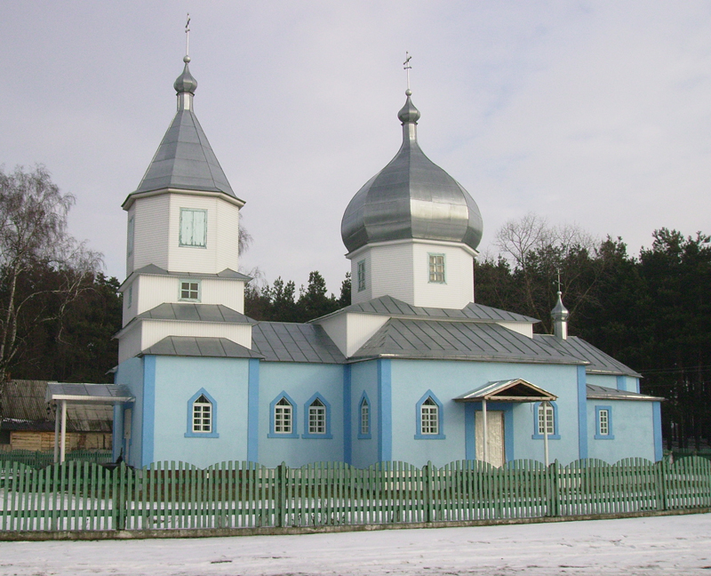 Церква Казанської ікони Божої матері в с. Одринки, Сарненського р-ну, Рівненської обл., яка була відкрита в 2003 році.